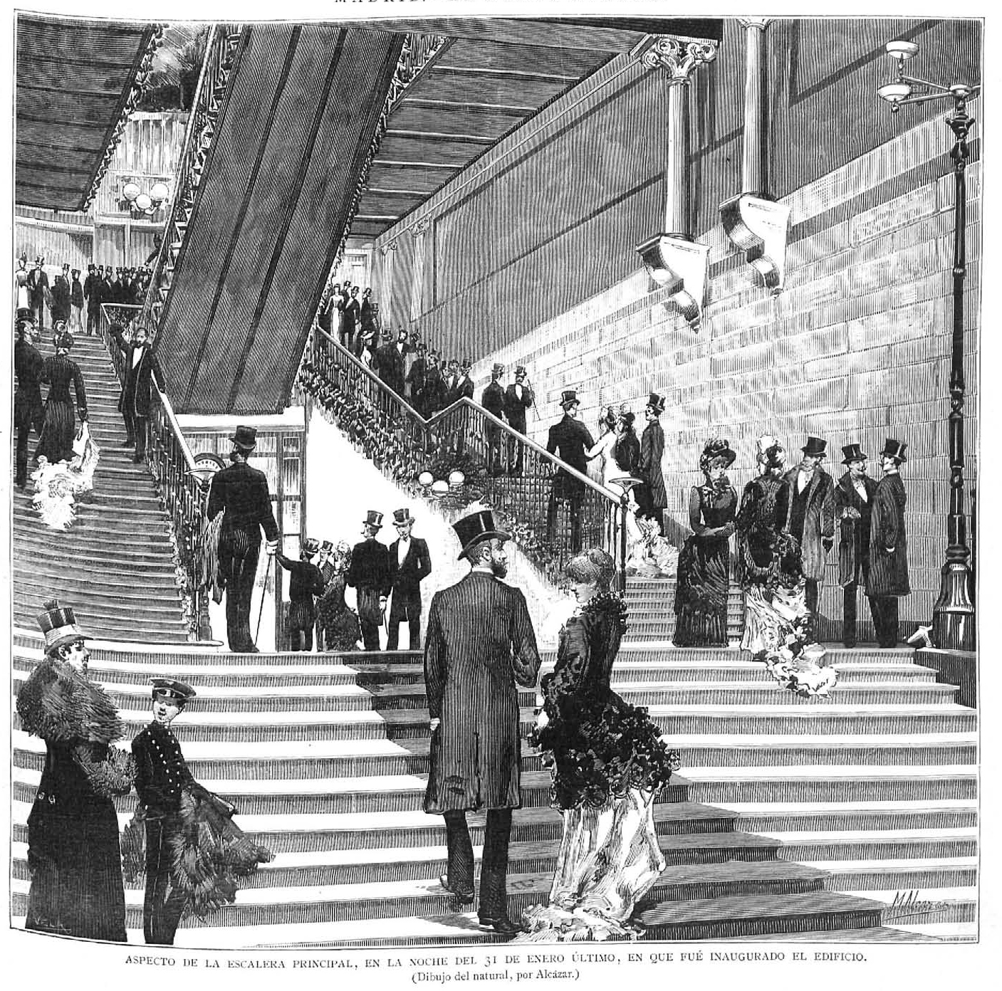 Madrid, nuevo Ateneo, aspecto de la escalera principal, en la noche del 31 de enero último, en que fue inaugurado el edificio, en la revista española La Ilustración Española y Americana.